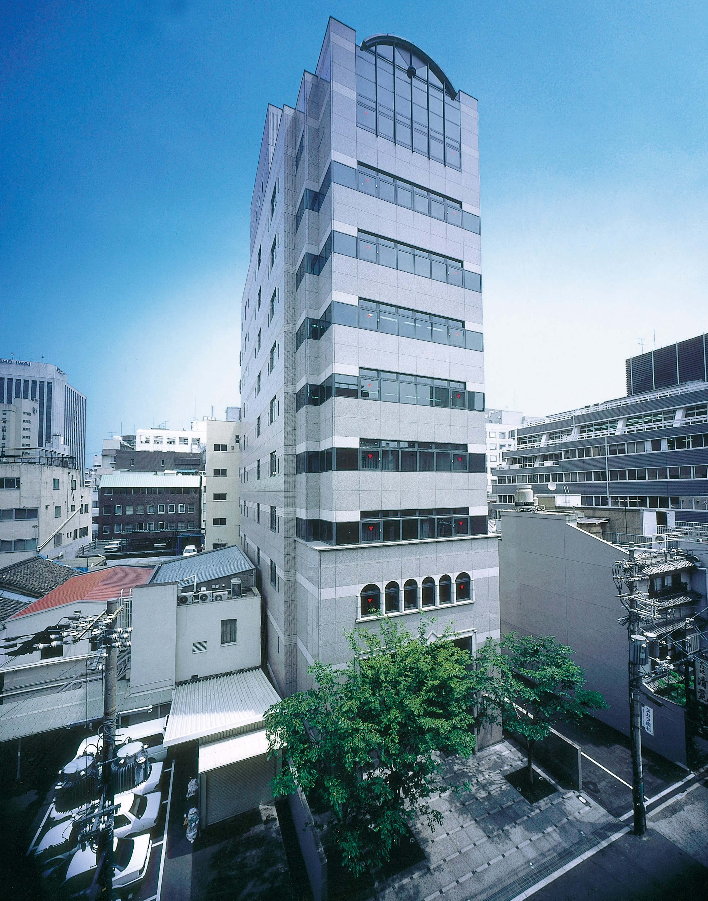 自社ビルの写真